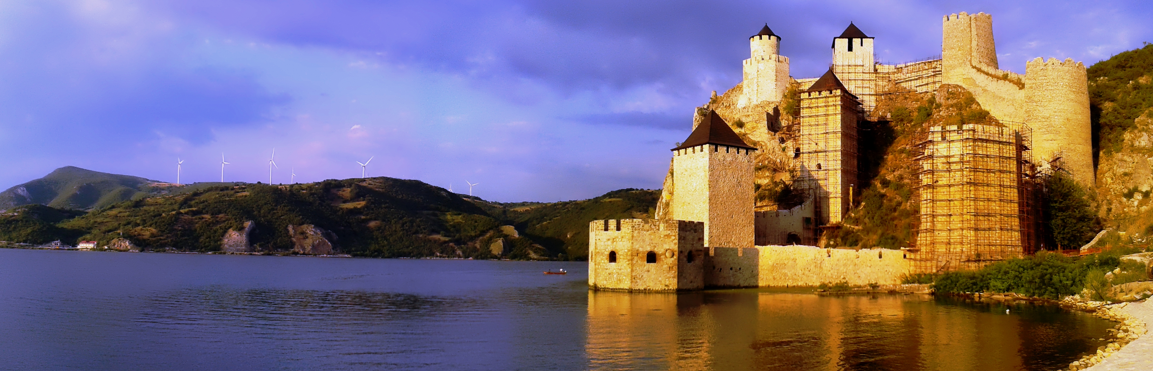 Panorama Golubačke tvrđave